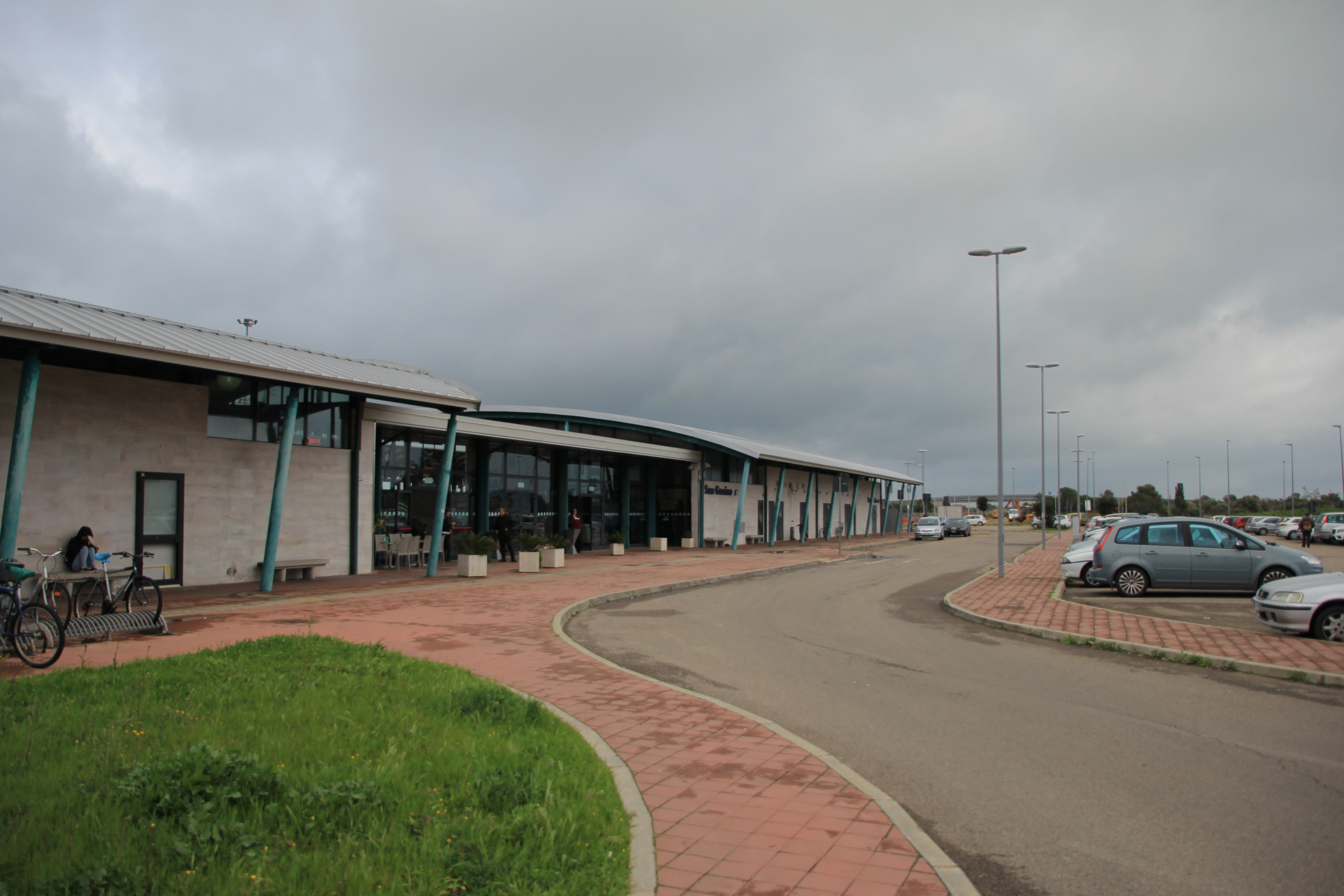 San Gavino Monreale - Stazione ferroviaria